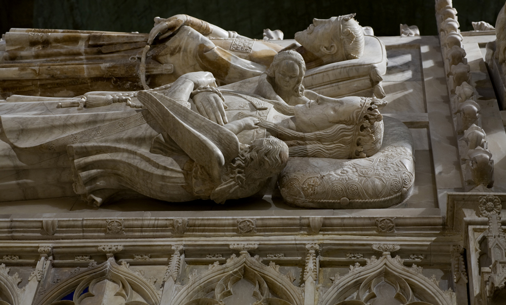 unidentified Spain